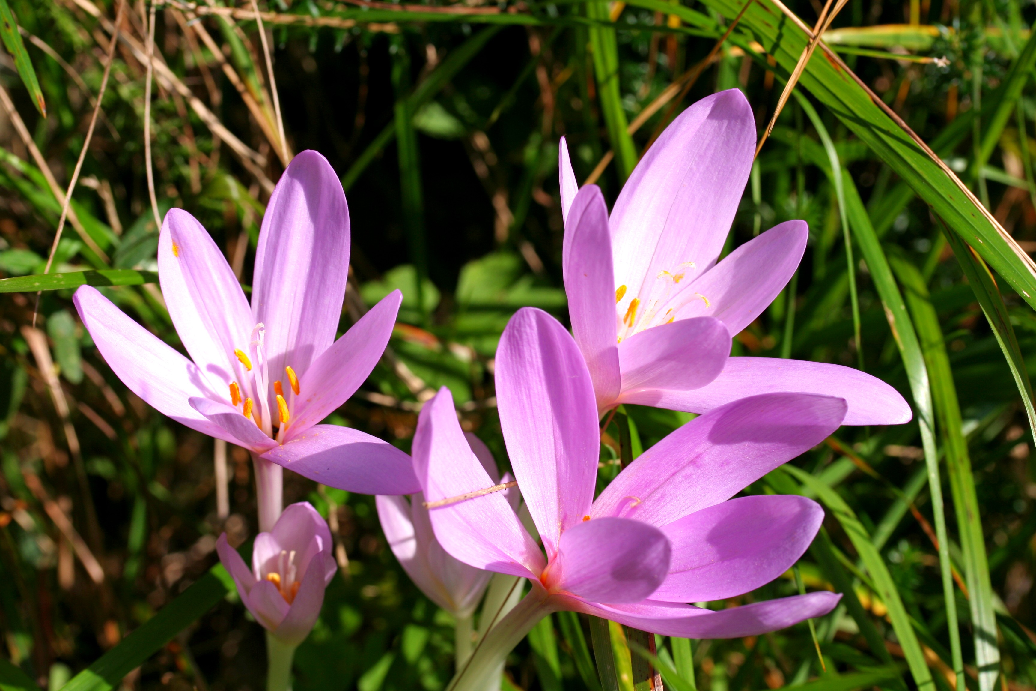 Colchico d'autunno - Località : Pranolz, Trichiana (BL), 733 m s.l.m.